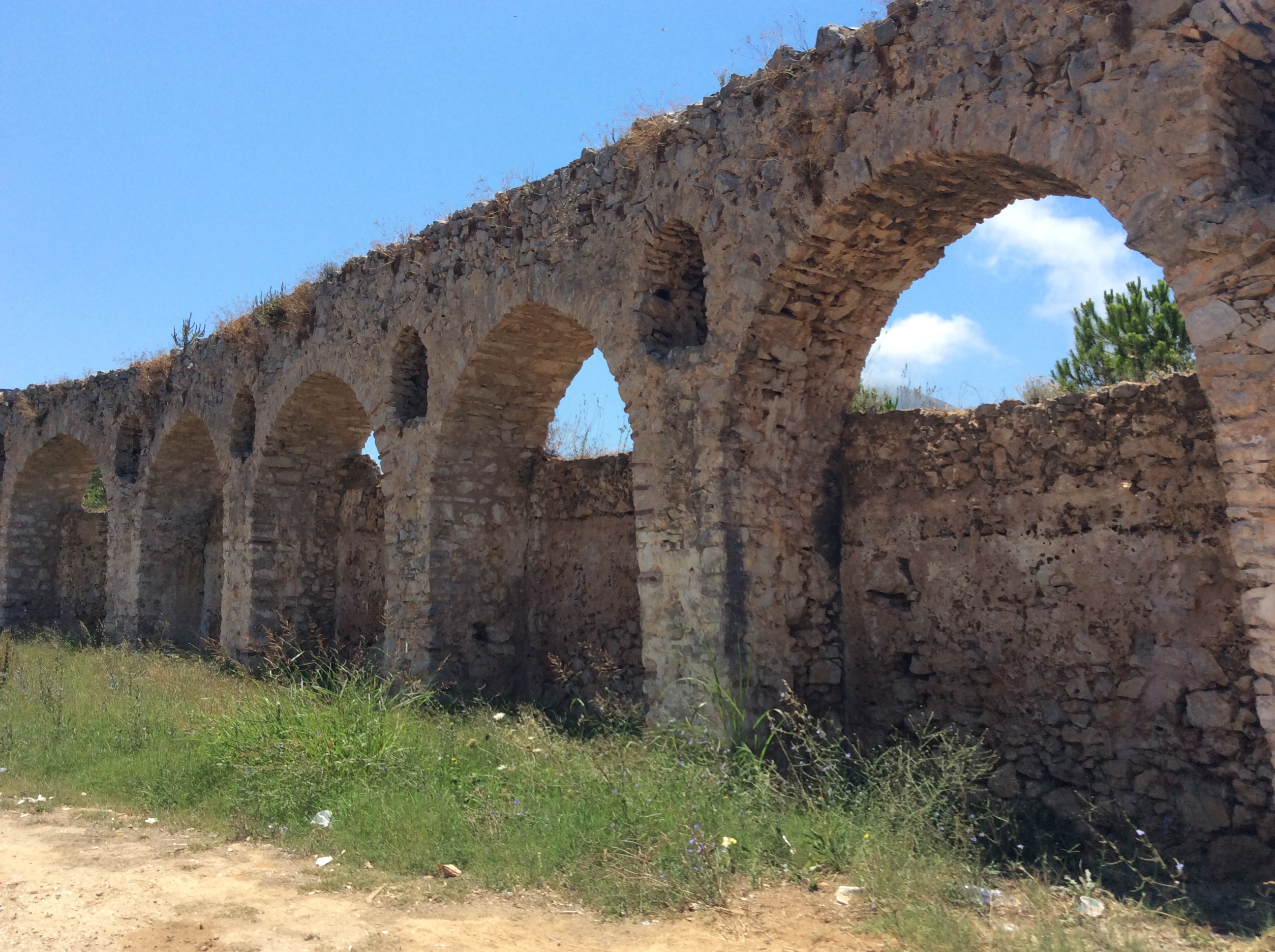 Πύλος - Το παλαιό υδραγωγείο της Πύλου.